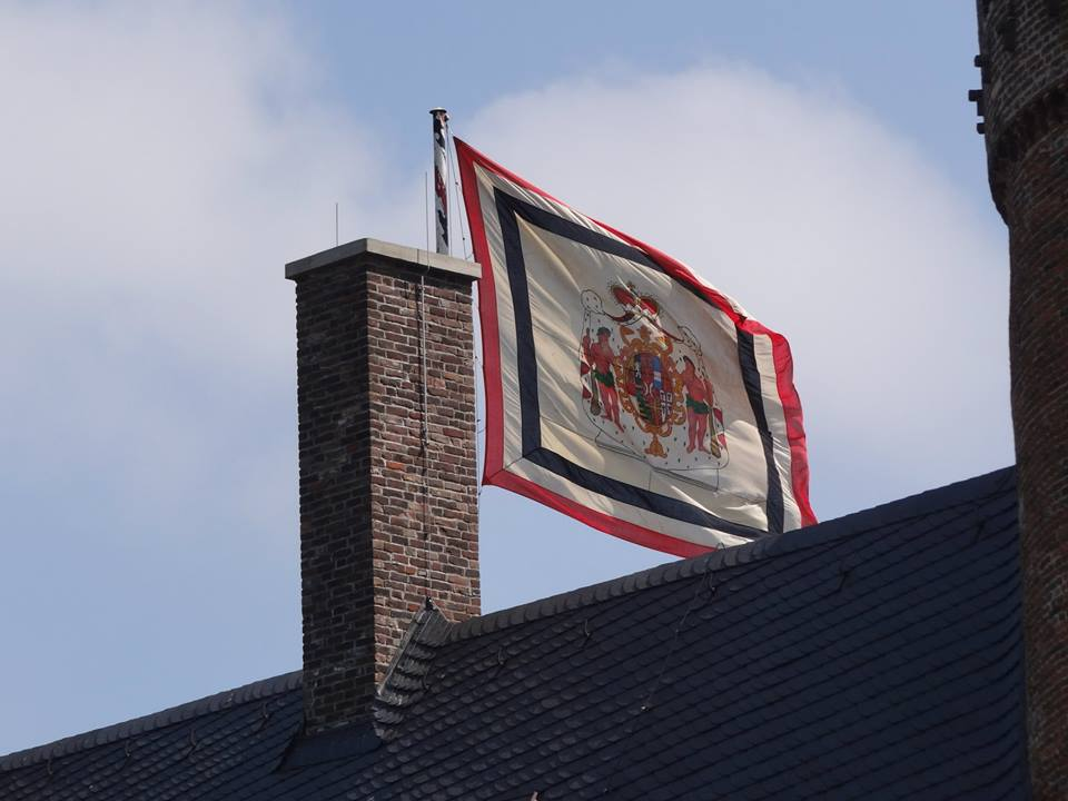 Wasserburg Anholt